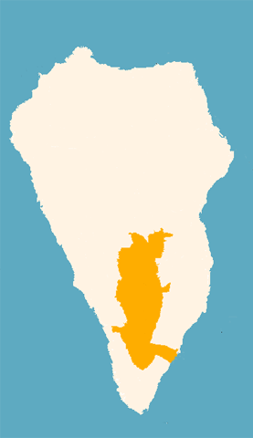 Localizacion de Cumbre Vieja